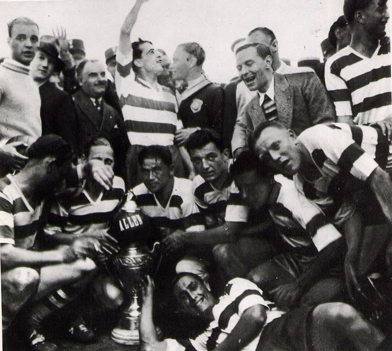 Le FC Sète vainqueur de la Coupe de France de football en 1934